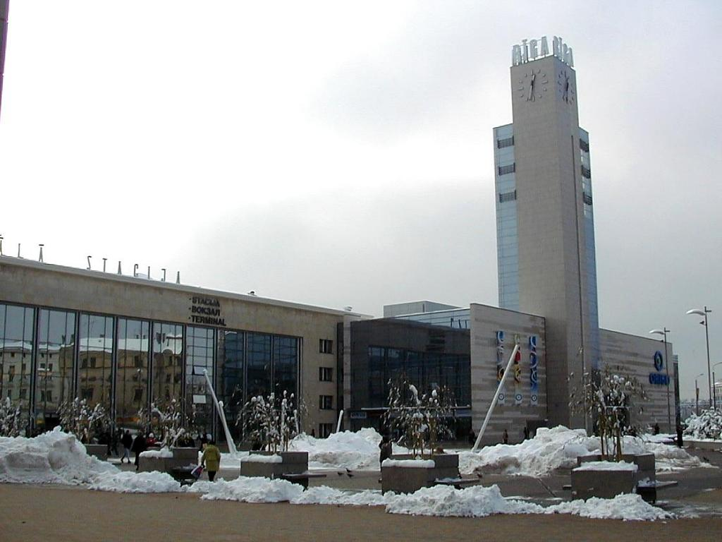 Rīgas centrālā stacija 2003-10-27